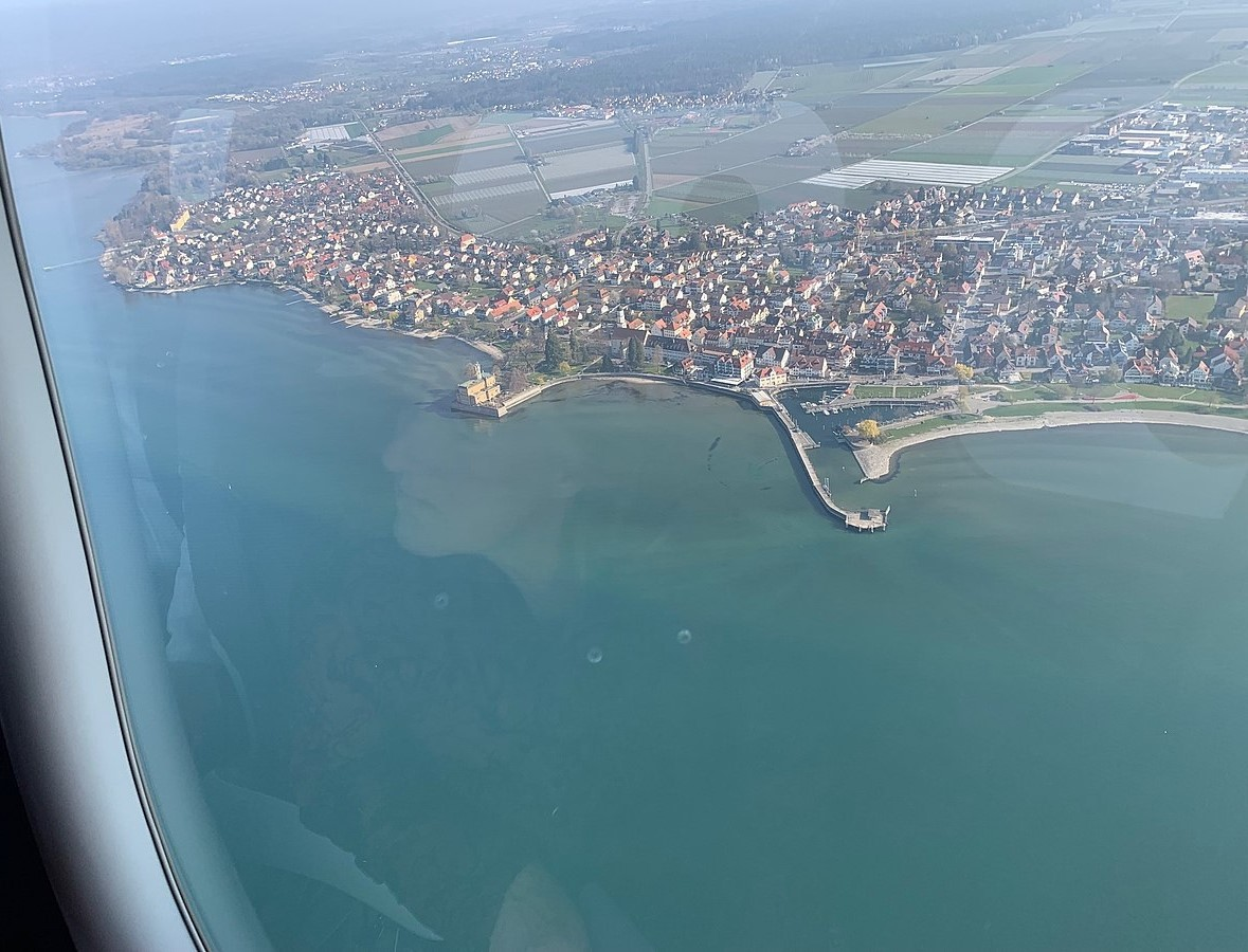 Luftaufnahme von Langenargen am Bodensee, aufgenommen aus einer Luftschiffgondel.